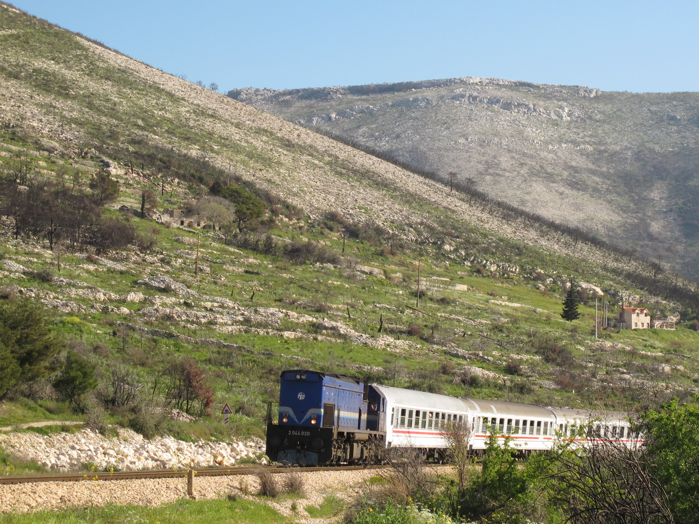 Zug mit HŽ 2044 030 bei Sadine